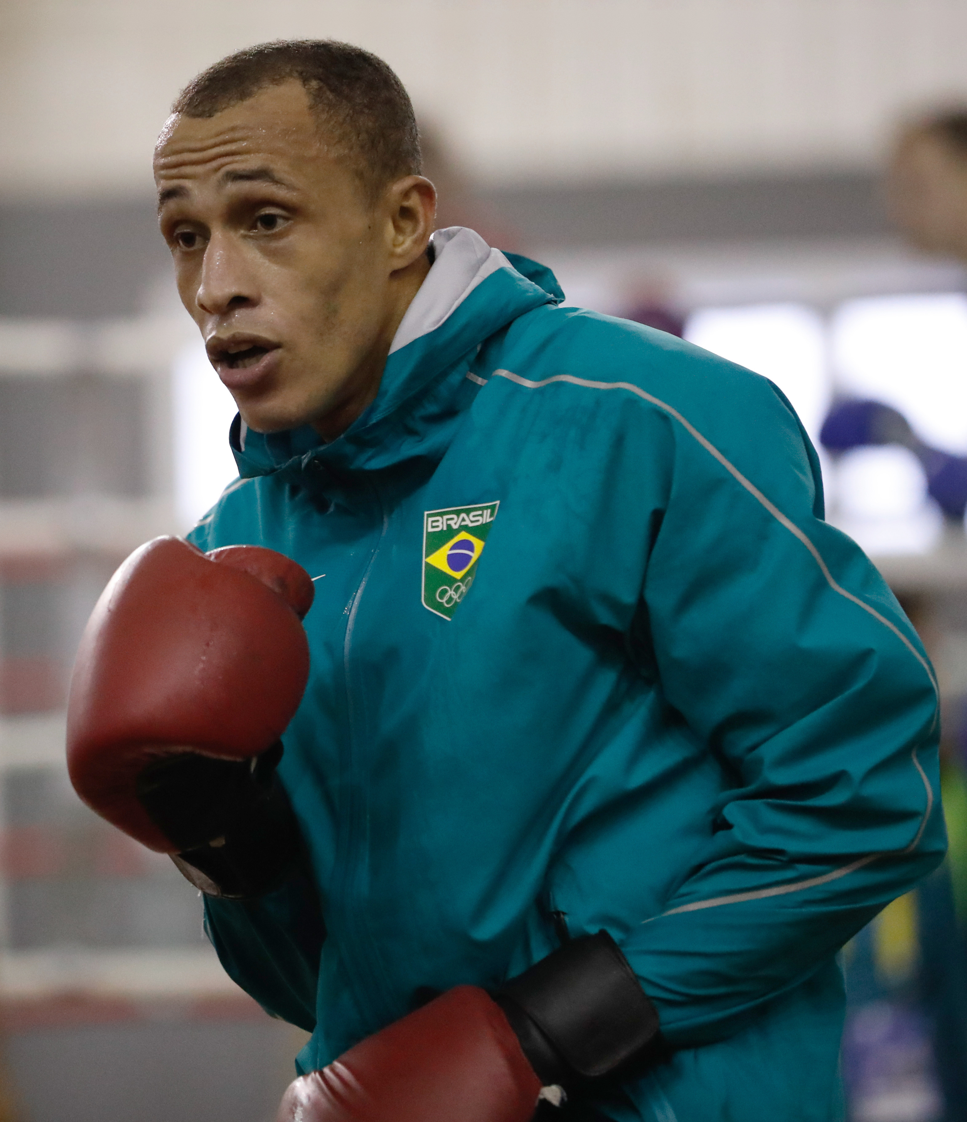 Rio de Janeiro - Robenilson de Jesus, atleta da seleção brasileira de boxe, durante treino para os Jogos Olímpicos Rio 2016 na base do Time Brasil, na Urca (Fernando Frazão/Agência Brasil)